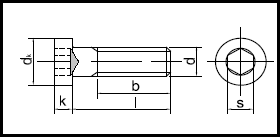 DIN 6912